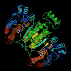 Isocitrate dehydrogenase enzyme from Escherichia coli PDB code: 1Ai3